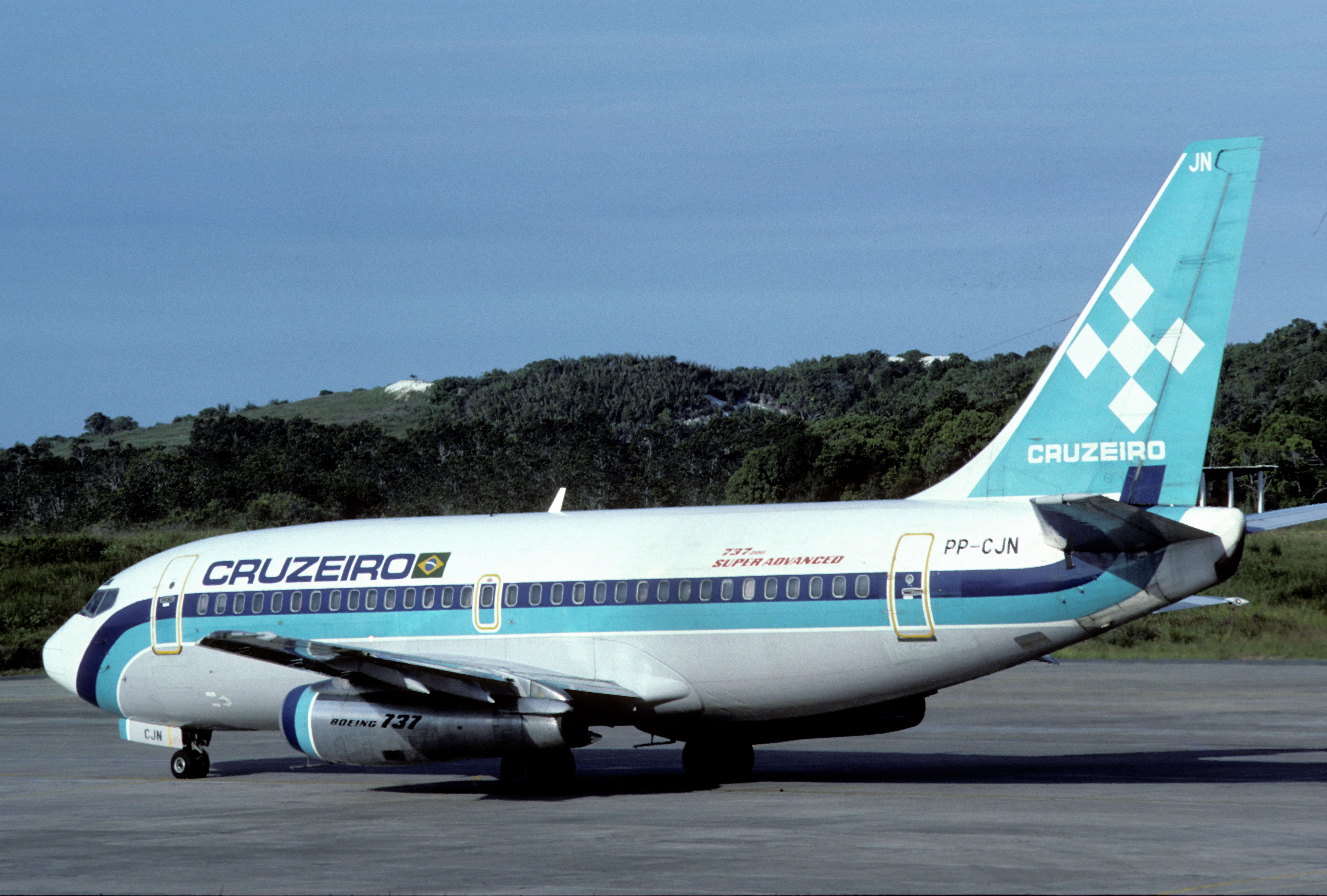 Cruzeiro do Sul Boeing 737-2C3 PP-CJN, April 1986/ BOW